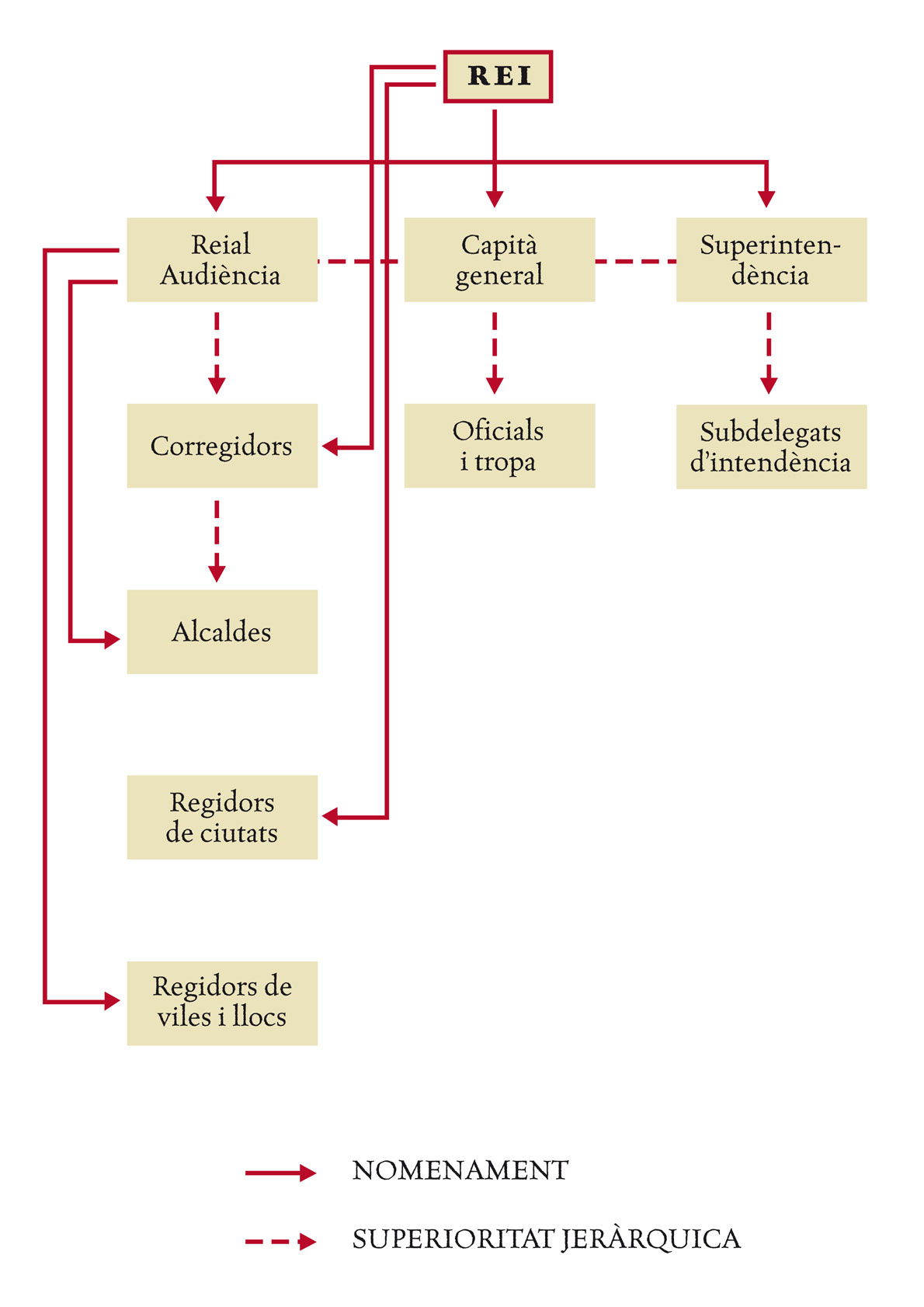 Esquema de la organització administrativa i judicial de nova planta que va imposar Felip V a Catalunya el 1716.